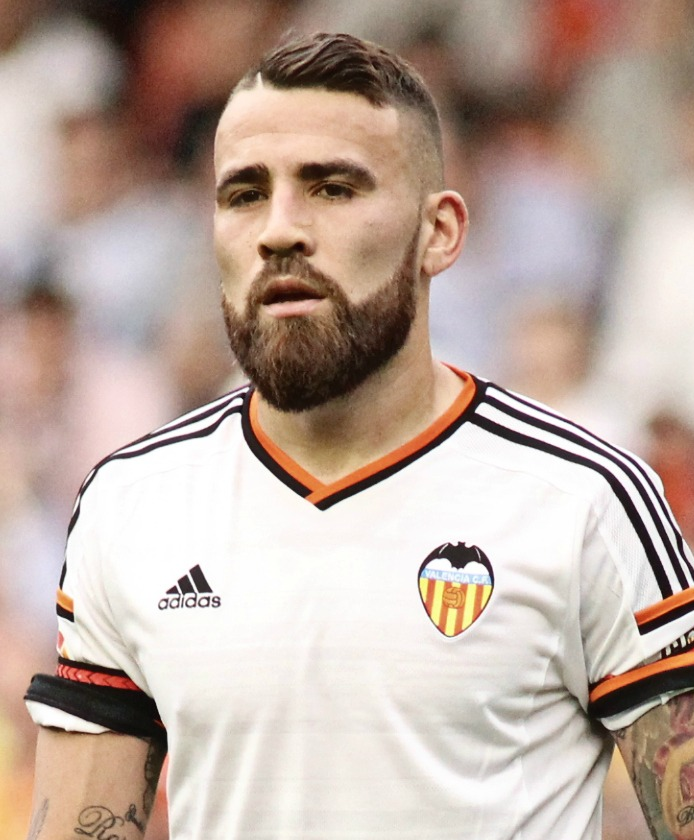 Nicolás Otamendi playing for Valencia CF in 2015 Fotografía: Carla Cortés / @noaasoka